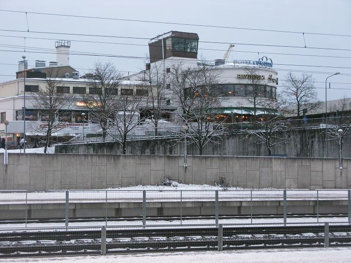 Hyvinkään Ykköskortteliin kuuluva Ahjon funkkistyylinen liikerakennus asemalaiturin yli nähtynä.